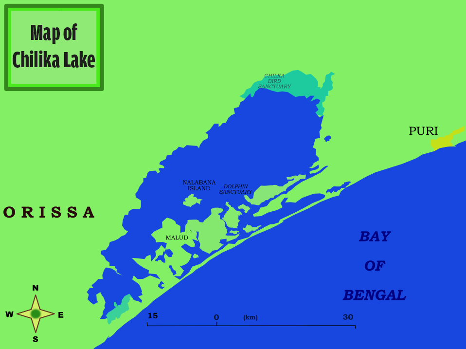 Map of Lake Chilka (Puri,Orissa, India).